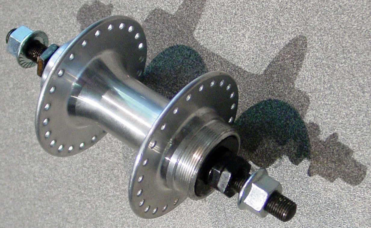 Fahrradnabe